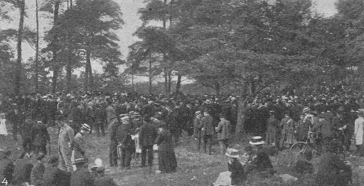 Storstrejskmöte i Hornsbergshage 1909